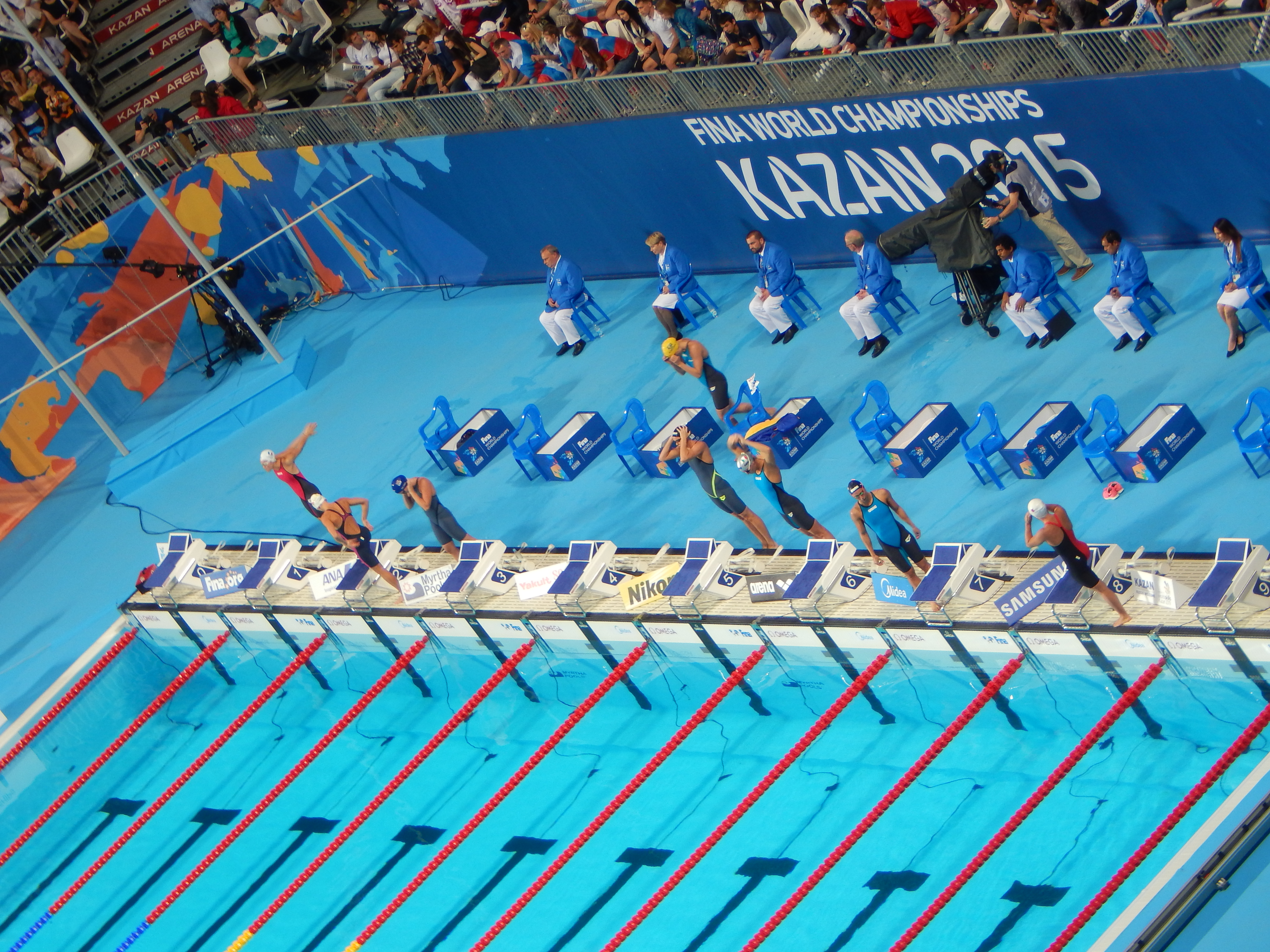 Заплыв на чемпионате мира в Казани баттерфляем 50 метров полуфинал